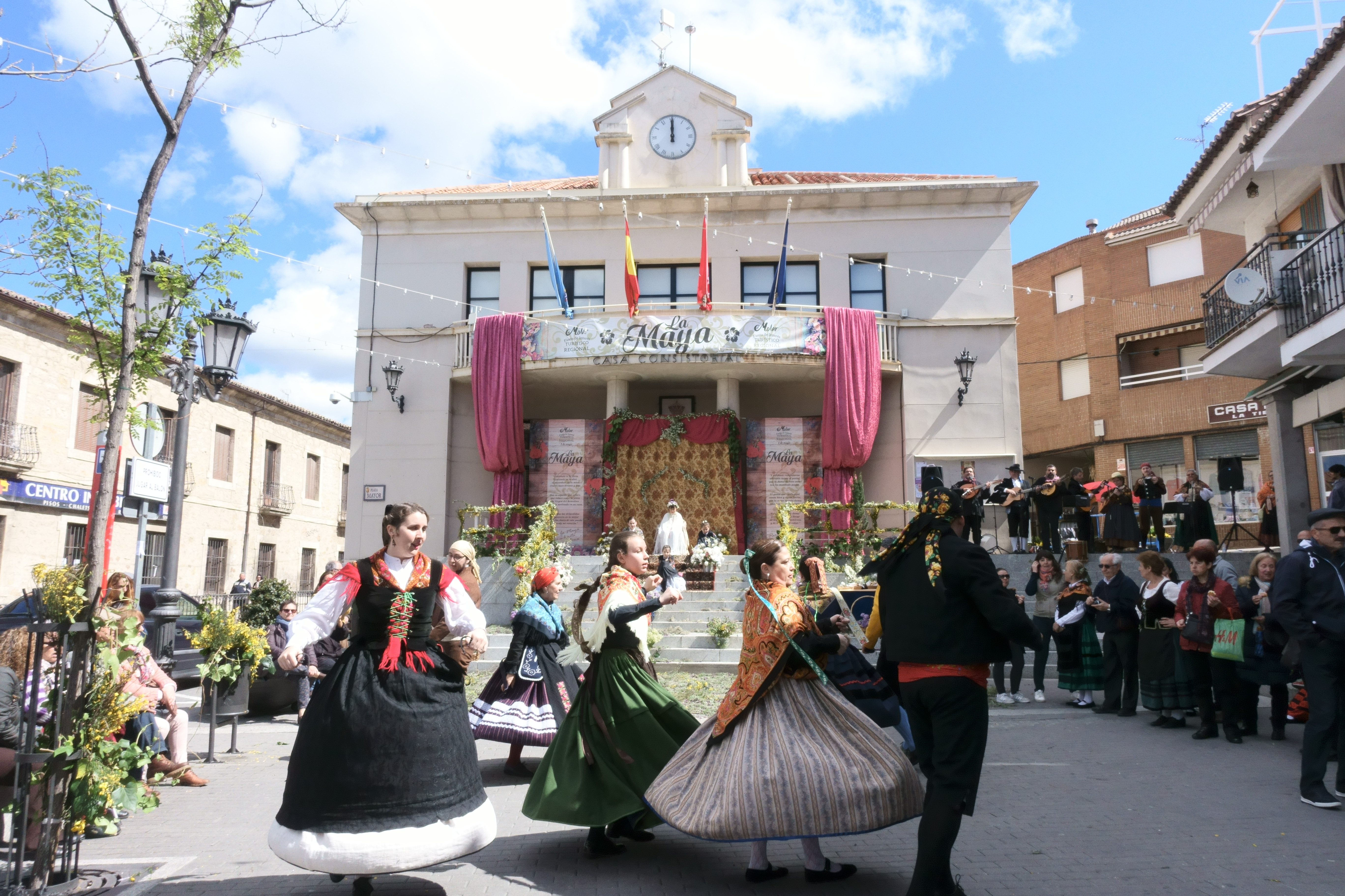 Fiesta de la Maya 2018, El Molar (Madrid, España). This is a photography of a Folklore festival in Spain (Wikidata id Q23455822).